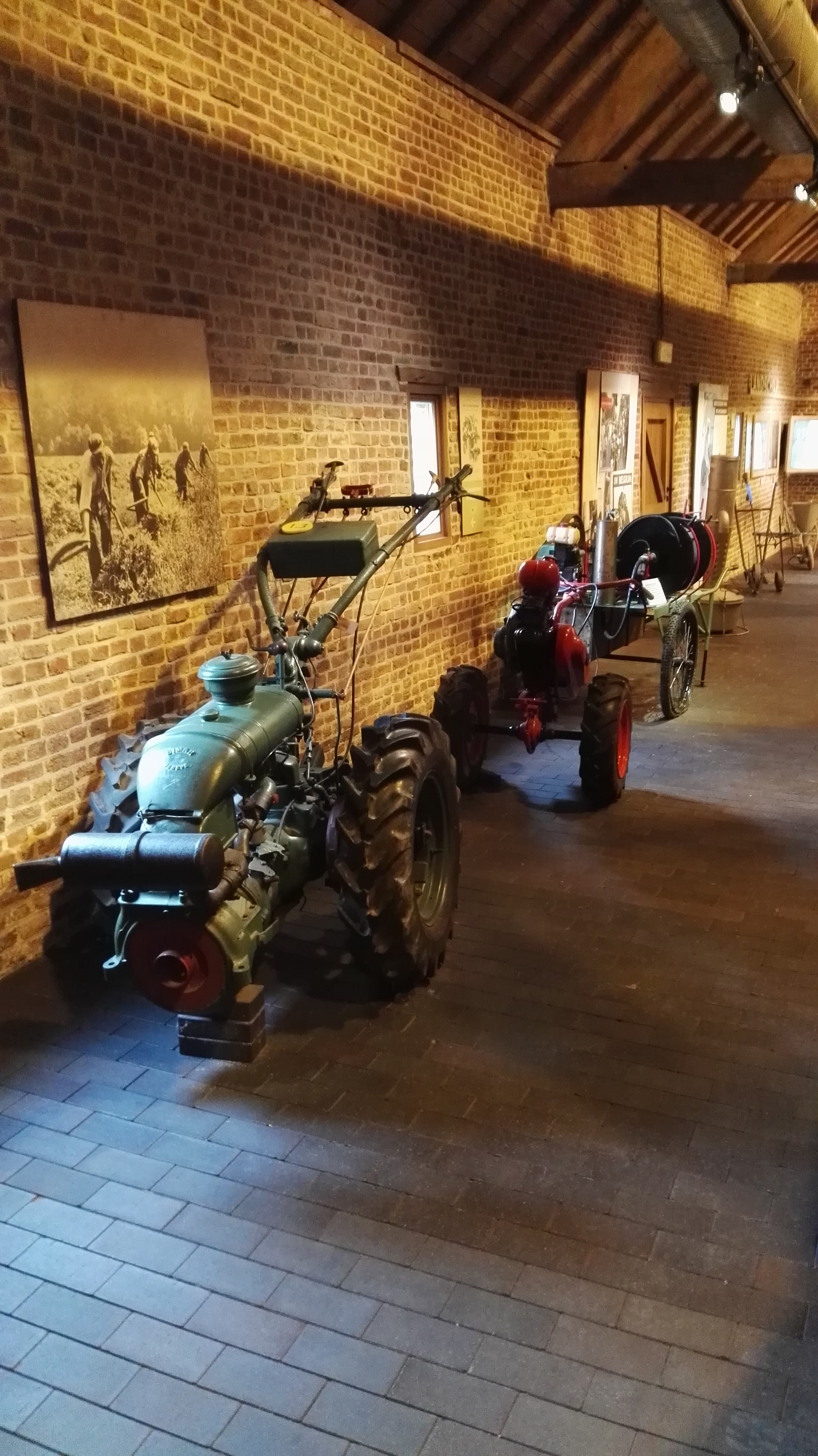 machine 't Grom